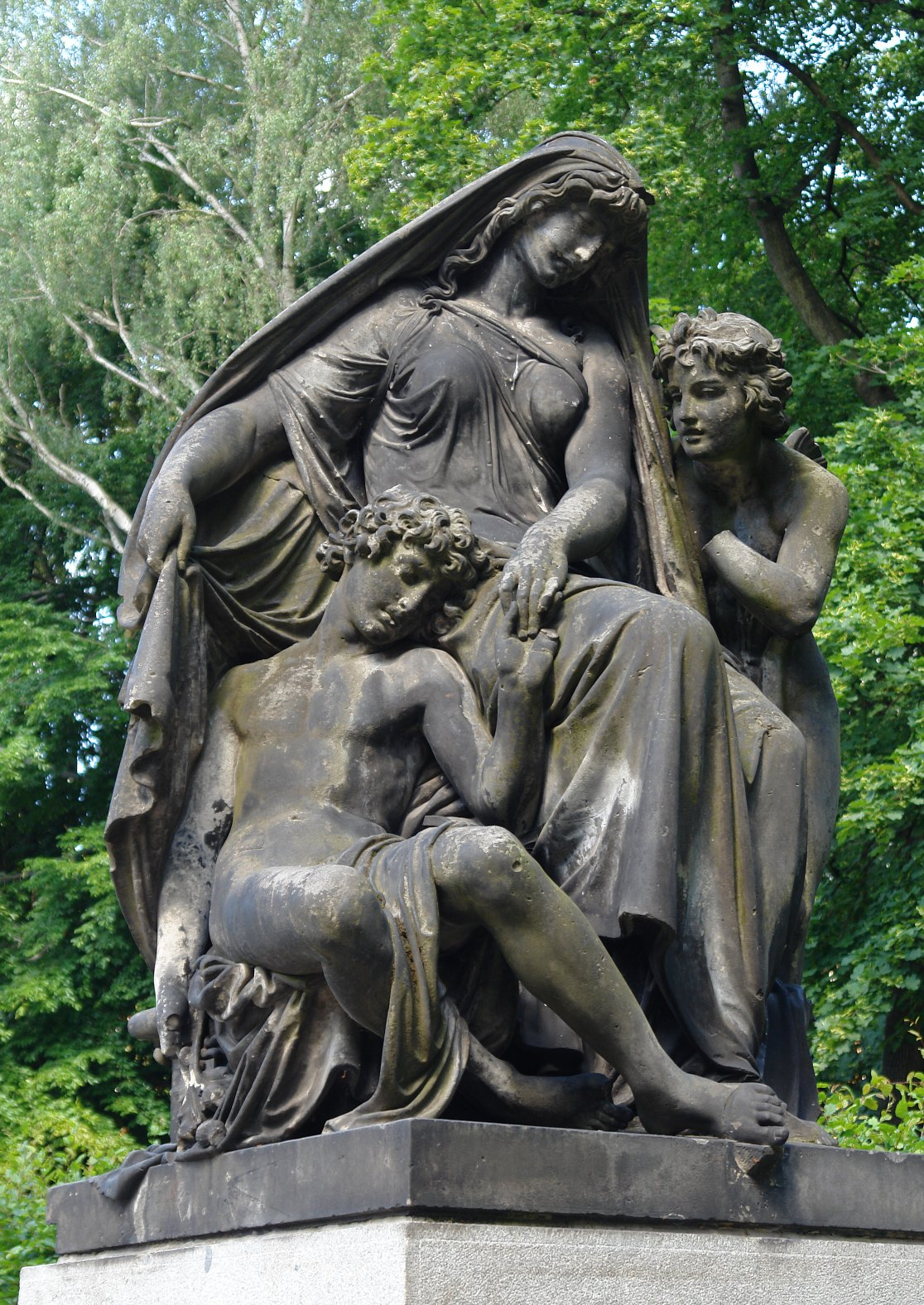 Sandstein-Original Die Nacht (aus Vier Tageszeiten) von Johannes Schilling 1868, ehemals Brühlsche Terrasse, heute Chemnitz-Schloßchemnitz